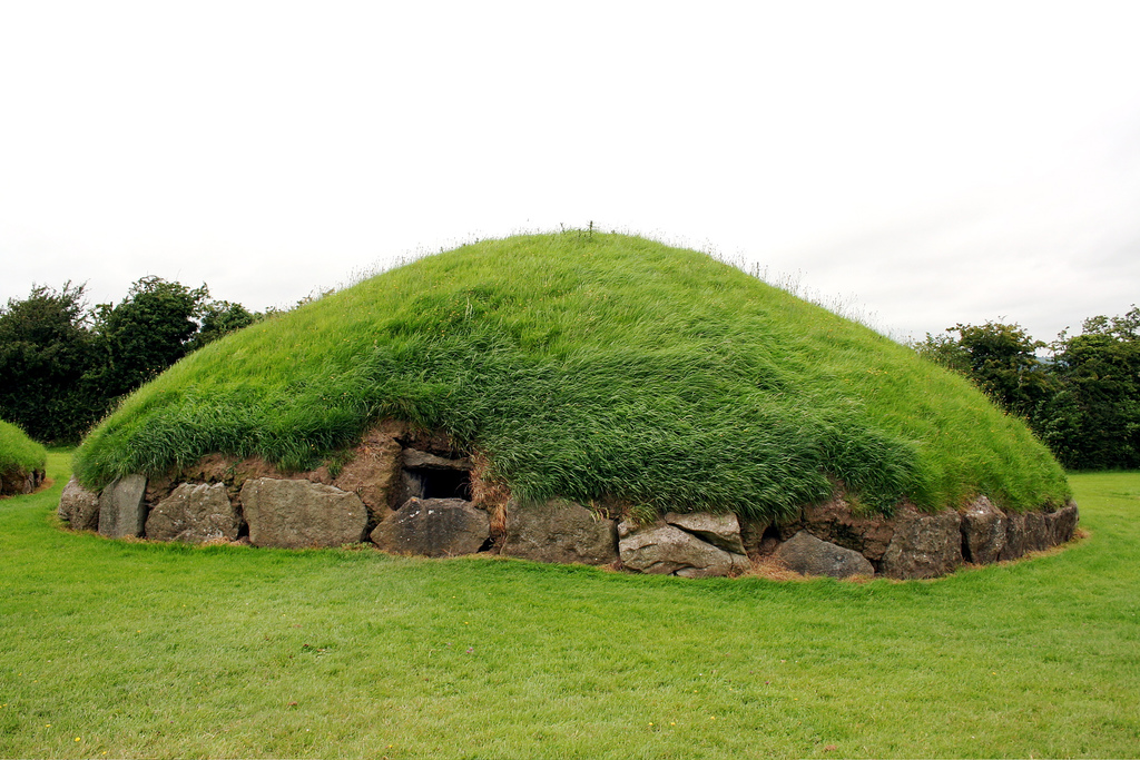 Yacimiento arqueológico de Meath